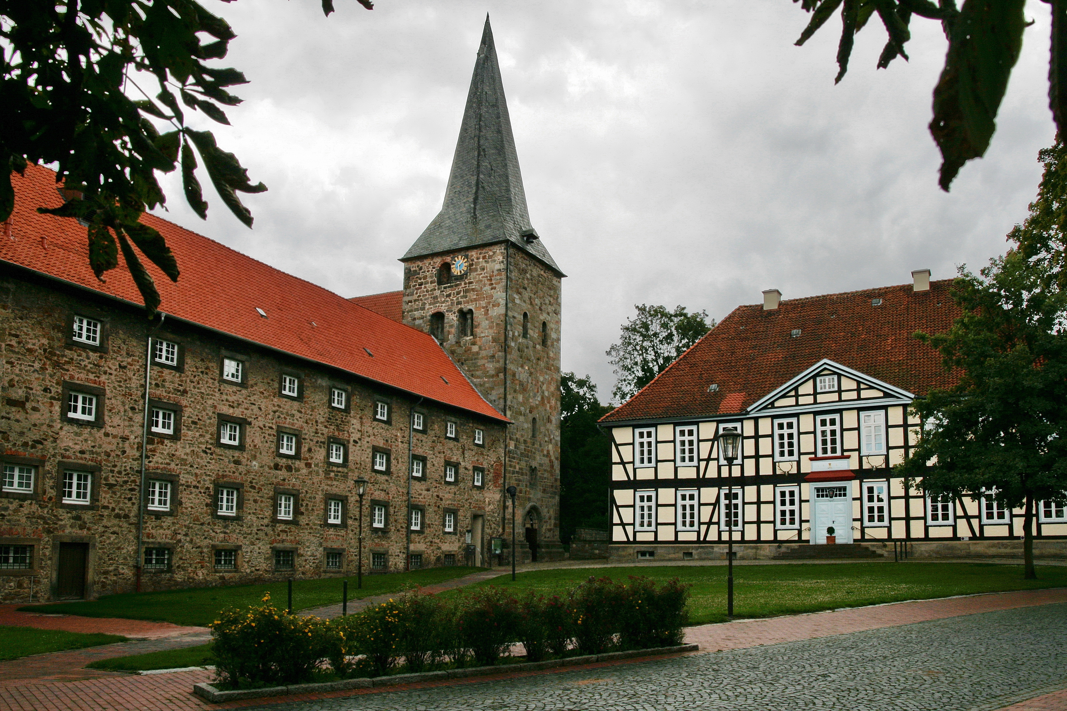 Kloster in Wennigsen (Deister) in Niedersachsen, Deutschland